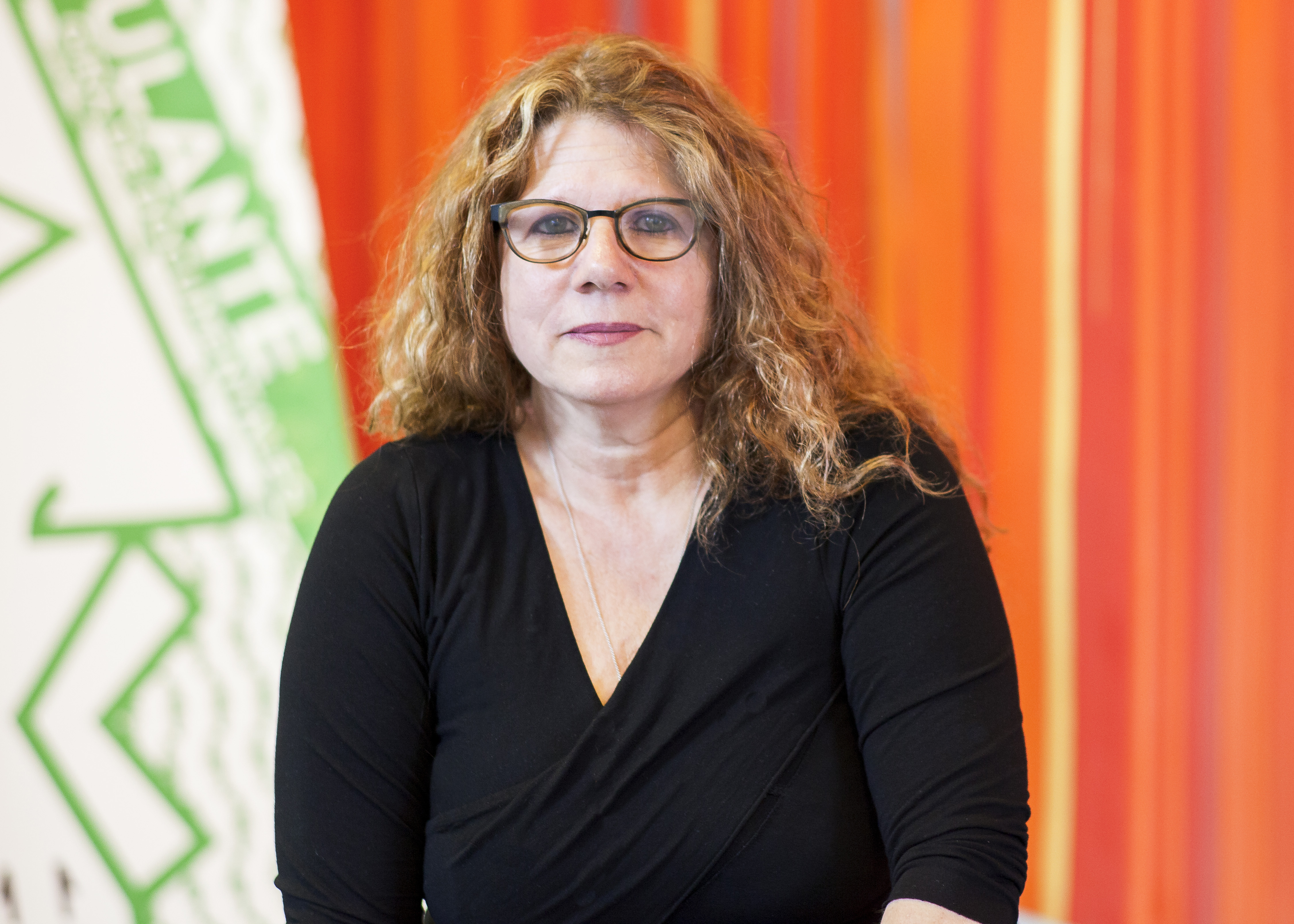 Trisha Ziff, directora del documental: "El hombre que vio demasiado". Goethe-Institut, 29 de marzo. Festival Ambulante 2016. Fotografía, Cristina Cerda.